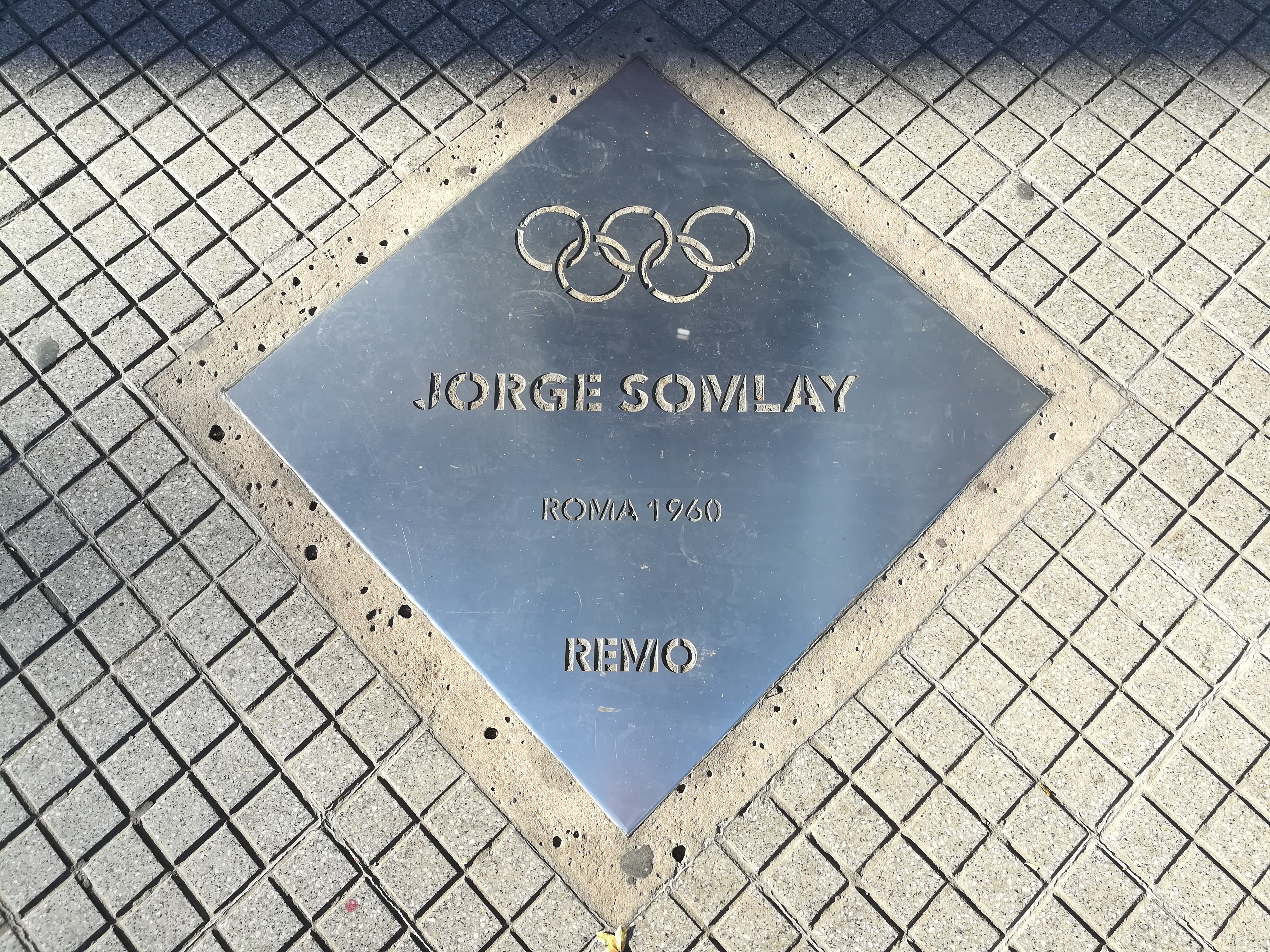 Paseo de los Olímpicos de los en la Avenida Pellegrini (Rosario).